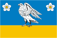 Флаг Новомалороссийского сельского поселения, Краснодарский край, Россия.